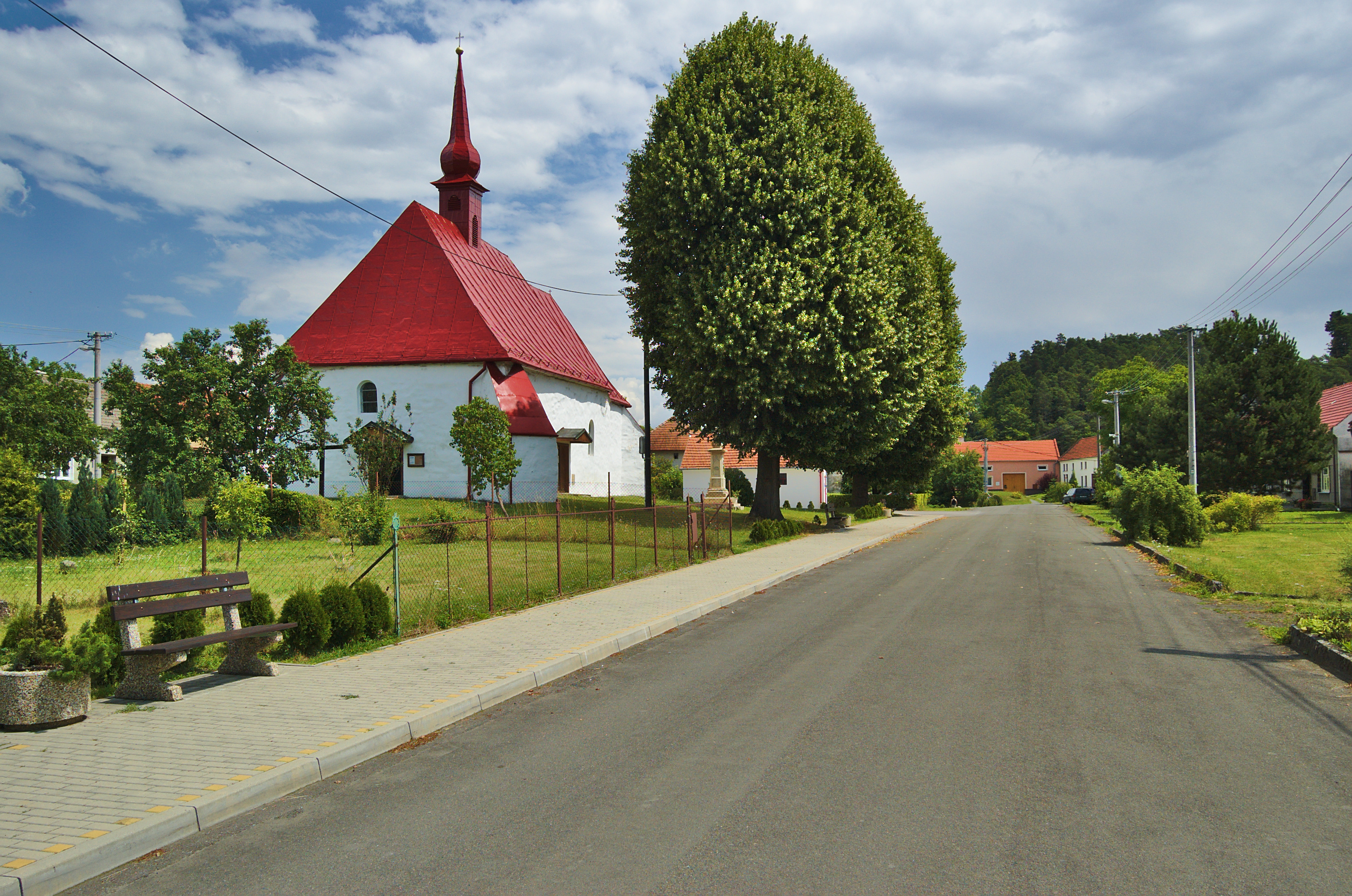 Kostel Povýšení svatého Kříže, Stínava, okres Prostějov